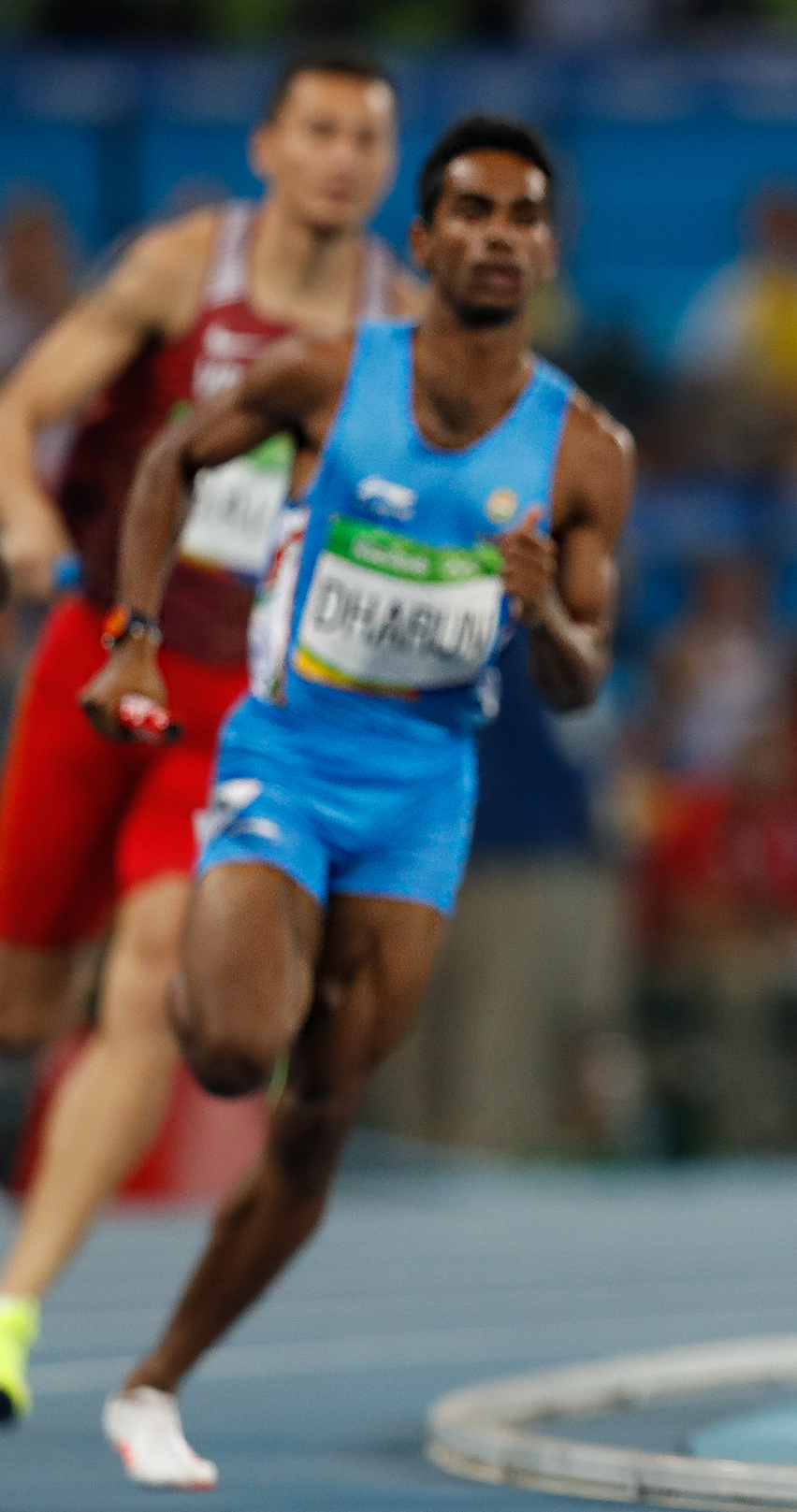 Rio de Janeiro - Eliminatórias do revezamento 4 x 400m nos Jogos Rio 2016, no Estádio Olímpico (Fernando Frazão/Agência Brasil)